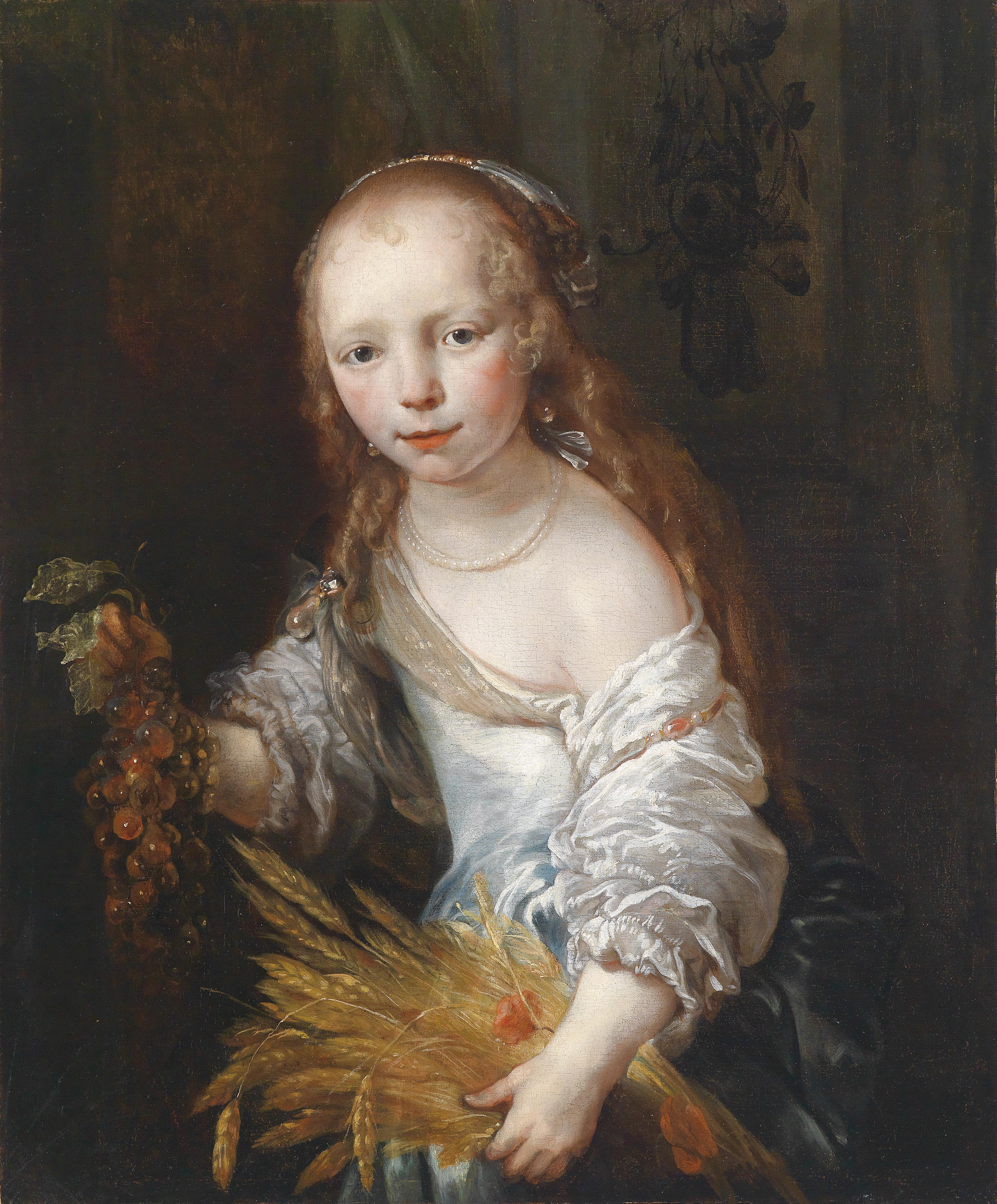 Porträt eines jungen Mädchens als Ceres